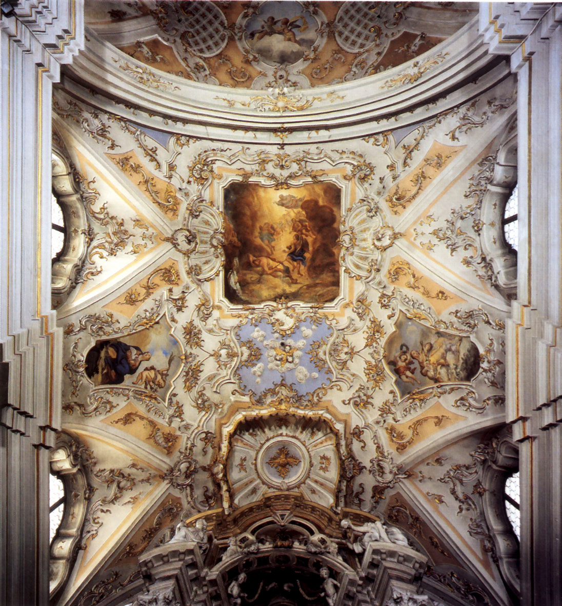 Volta della chiesa di Santa Maria Assunta in Villa Lagarina (Trento)